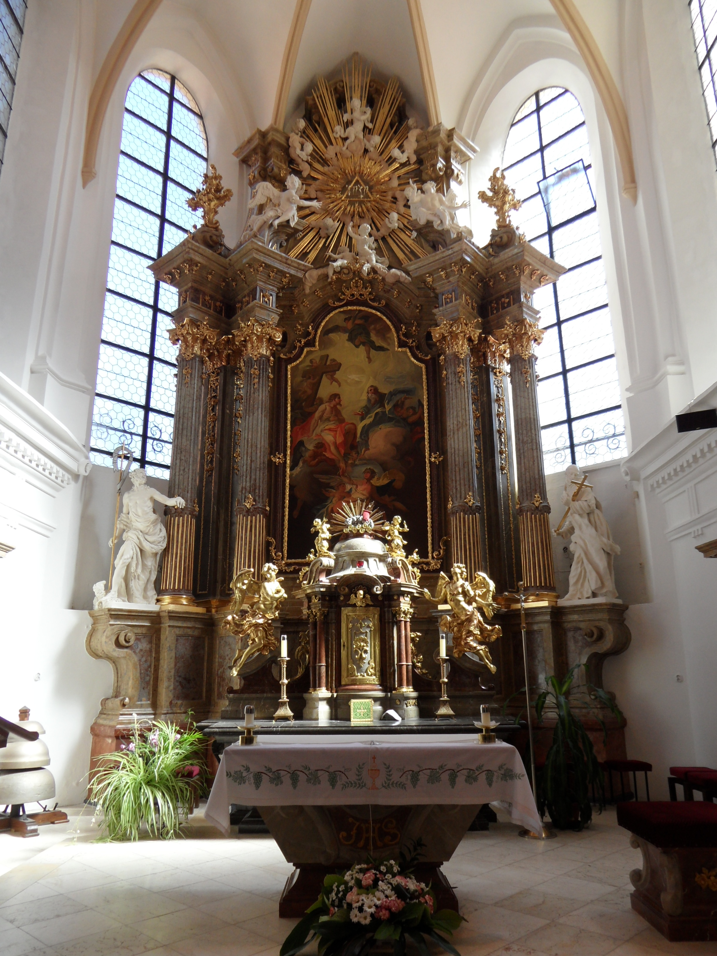 Hlavní oltář, kostel Nejsvětější Trojice, Brno (1766–1769) - Ondřej Schweigl